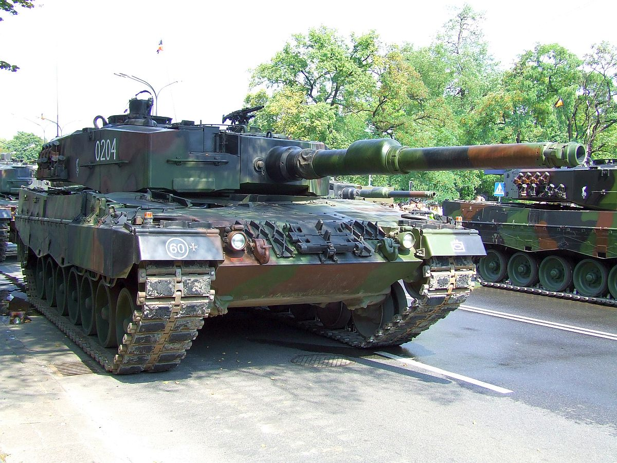 Leopard 2